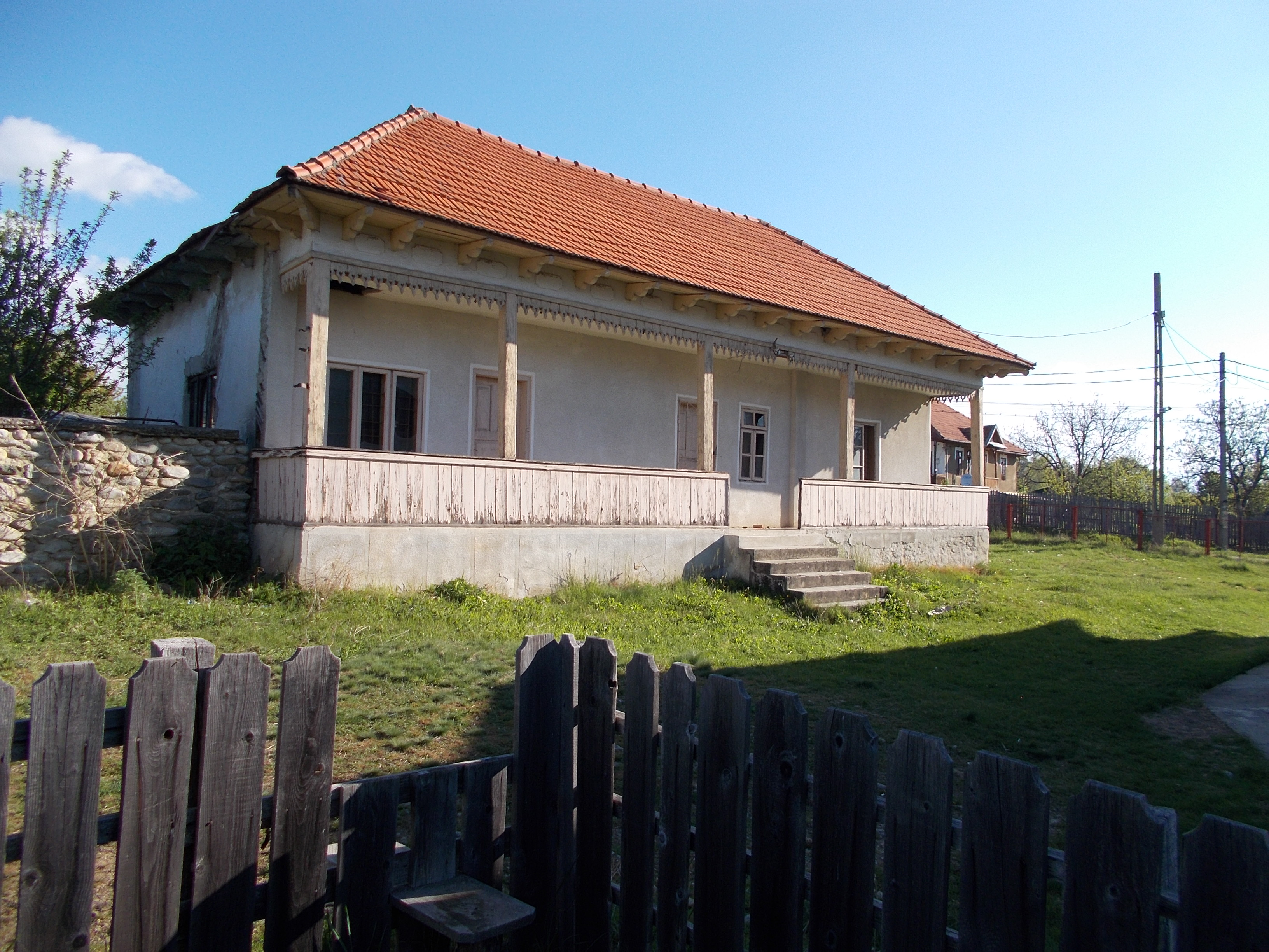 Școala din Bălcești, Gorj 01